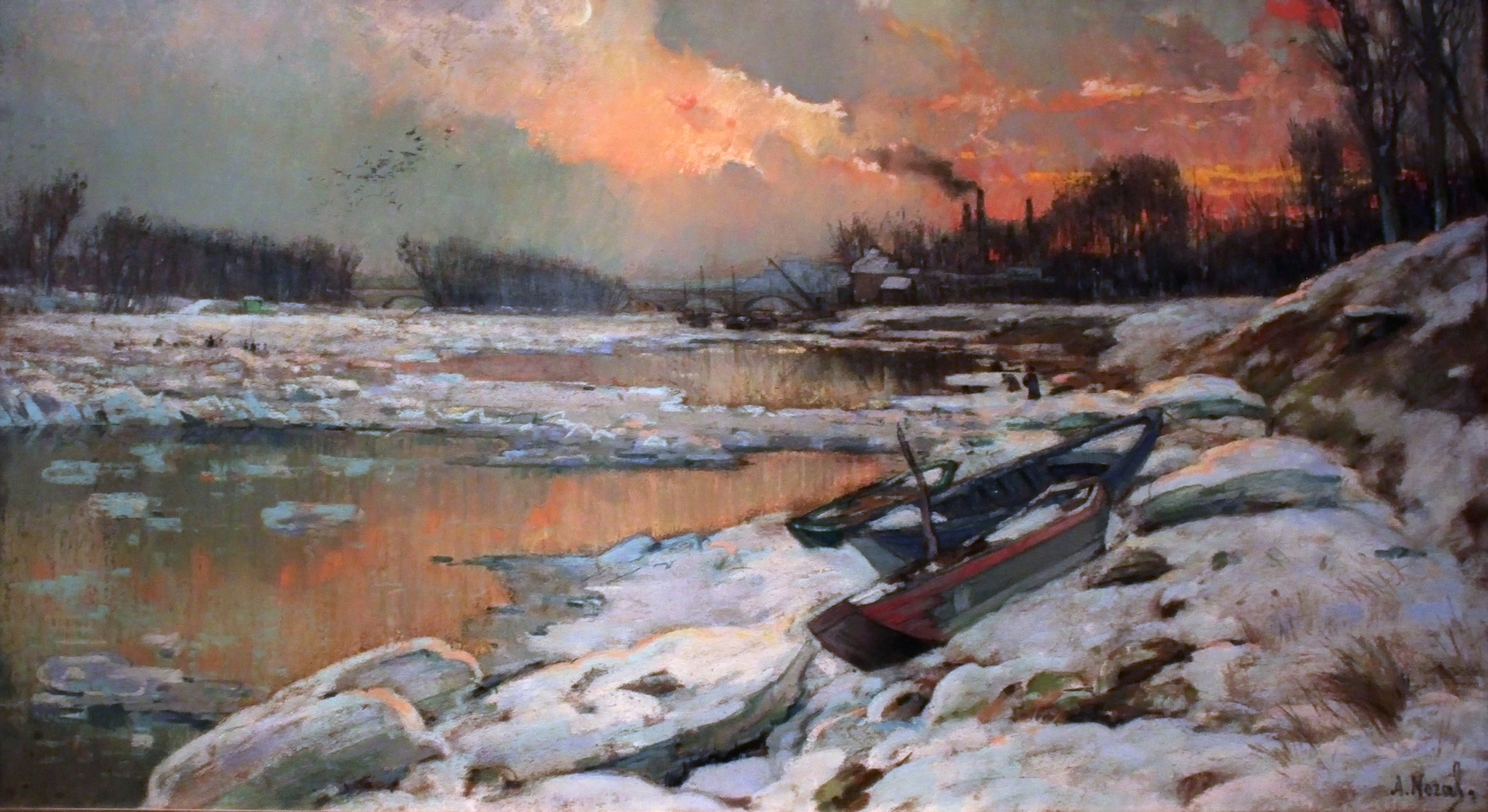 L'Embâcle de de la Seine entre Asnières et Courbevoie, pastel et crayon graphite sur toile par Alexandre Nozal, 1891. Appartient au fond du Musée des Beaux-Arts de la Ville de Paris ( Petit Palais ), présenté dans le cadre de l'exposition "L'art du pastel de Degas à Redon", du 15 Septembre 2017 au 8 Avril 2018.